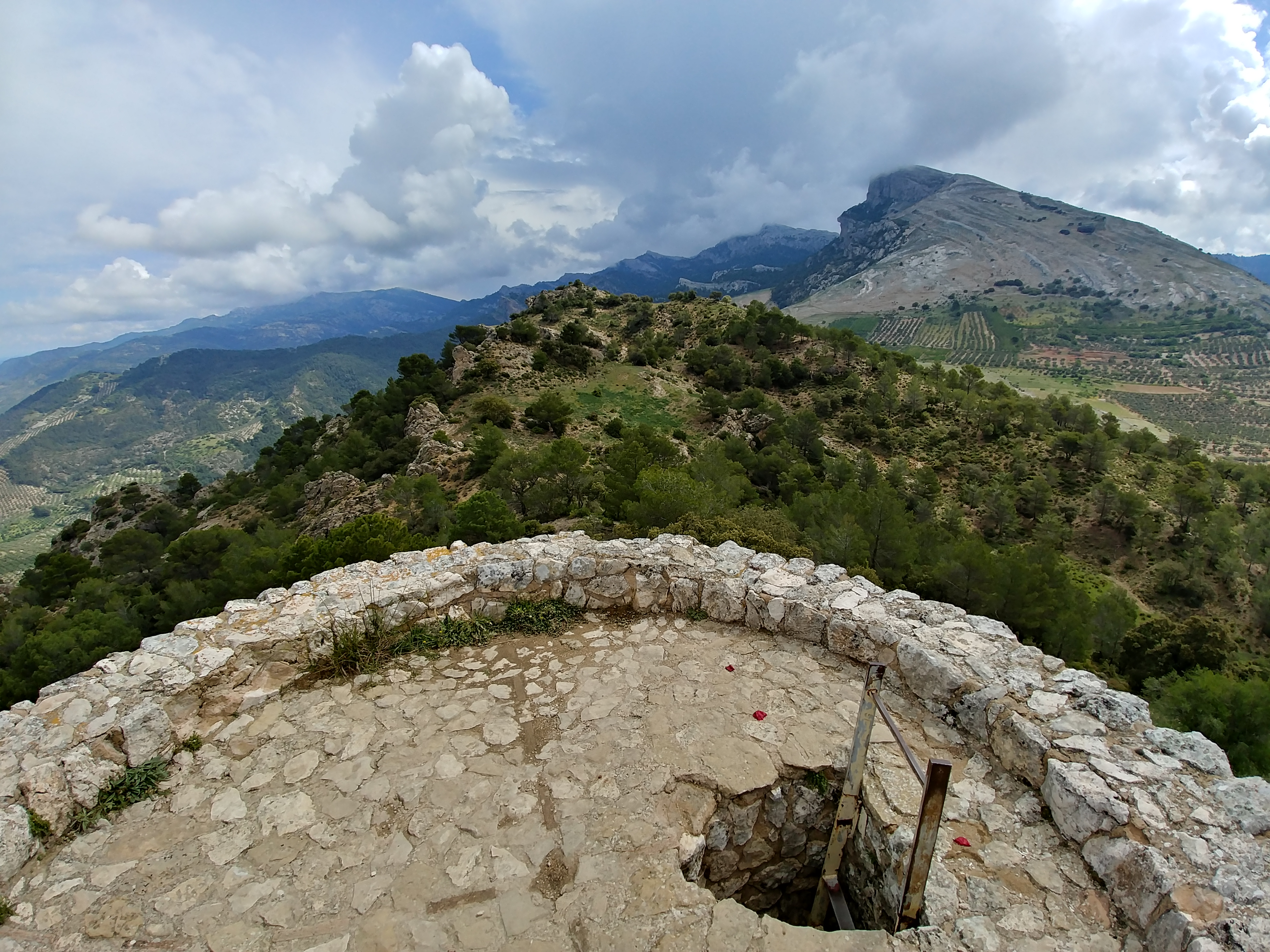 Vista de la Loma del Rayal al fondo, desde lo alto de la Atalaya del Infante Don Enrique.